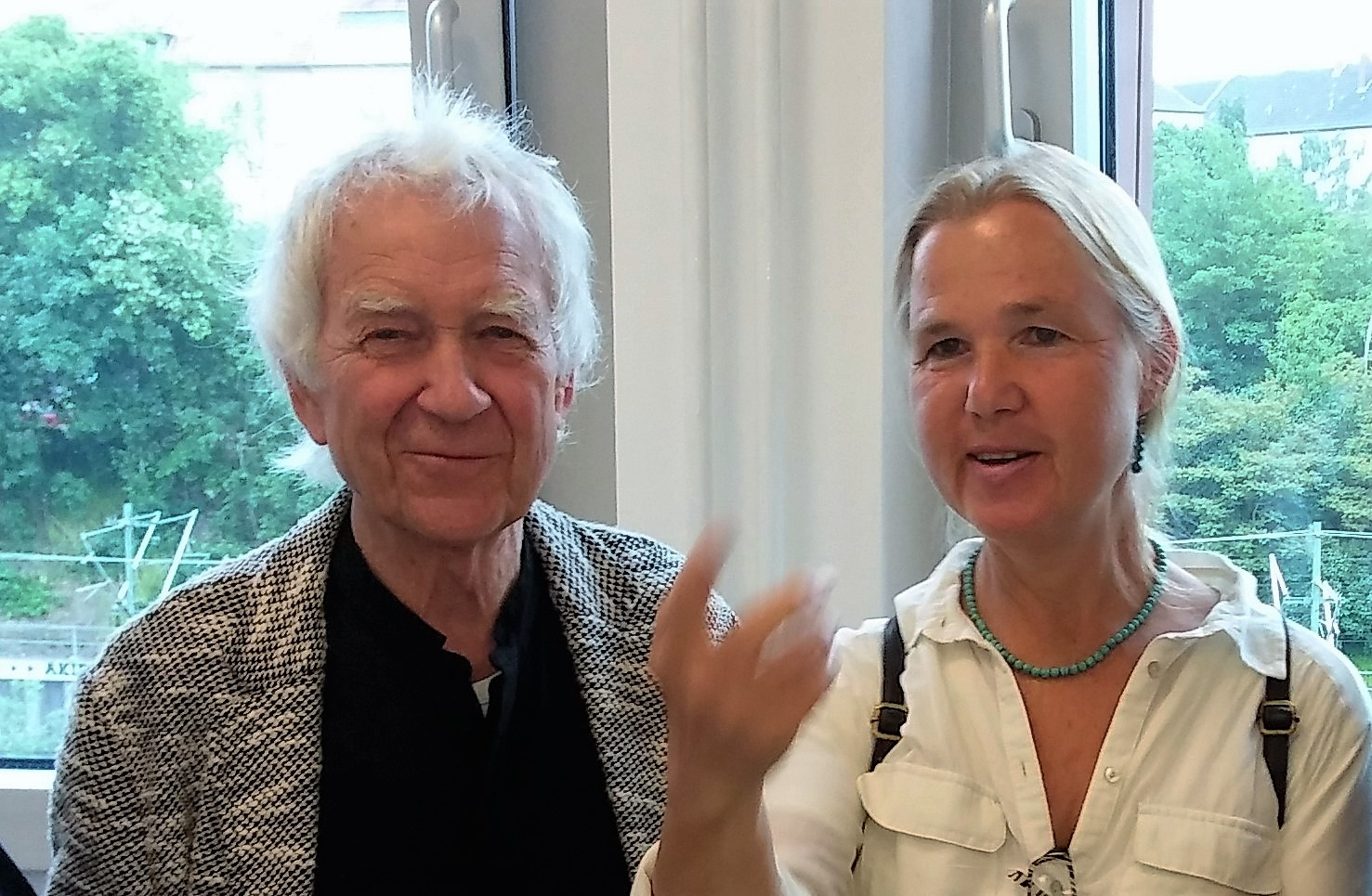 Die Maler Hans Stein und Anneli Schwager während einer Ausstellungseröffnung in Berlin.